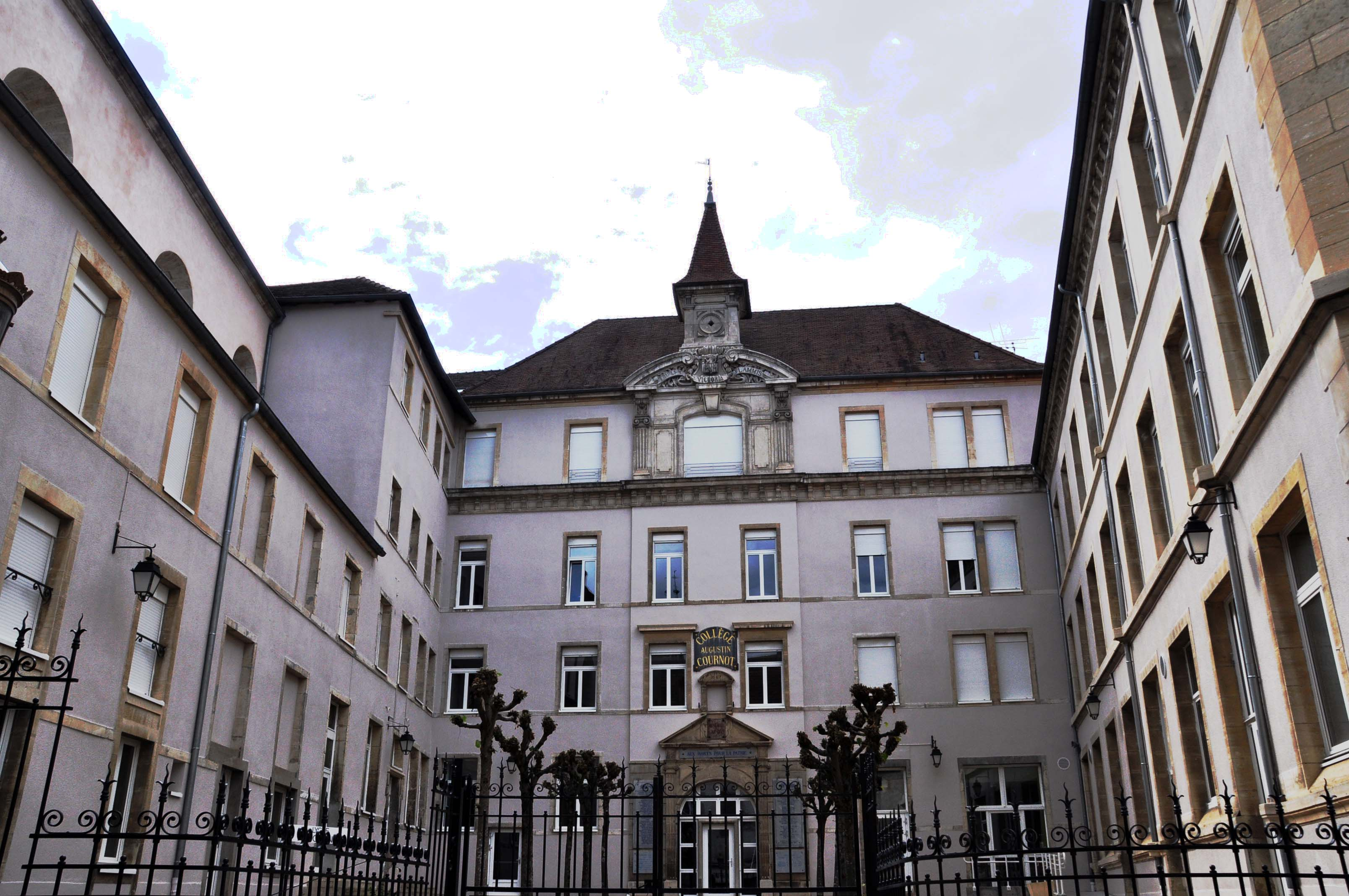 Collège des Jésuites de Gray, rue de l'Arsenal (Inscrit, 1984) .